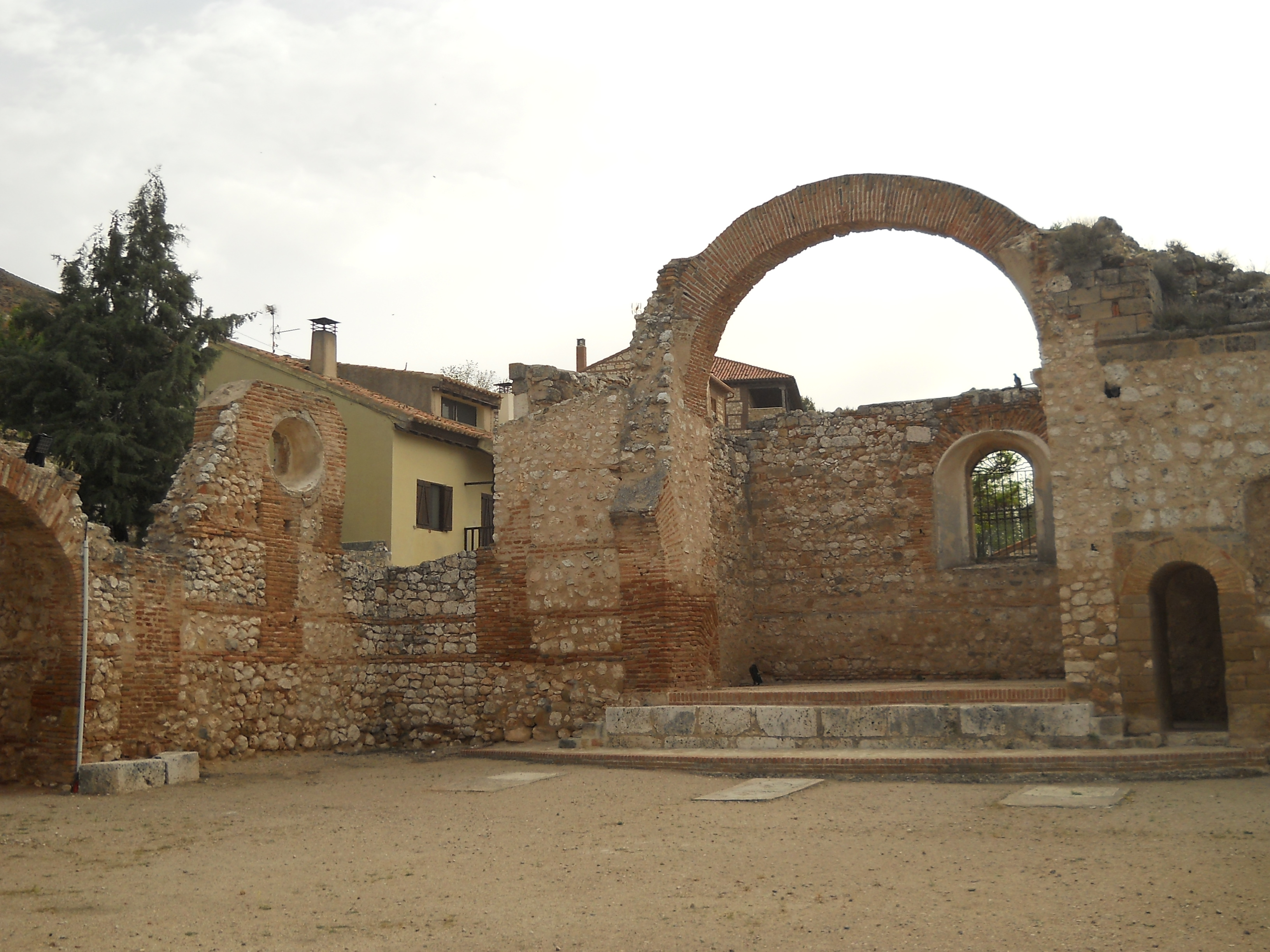 Restos de la iglesia de San Pedro, Hita, Guadalajara, España